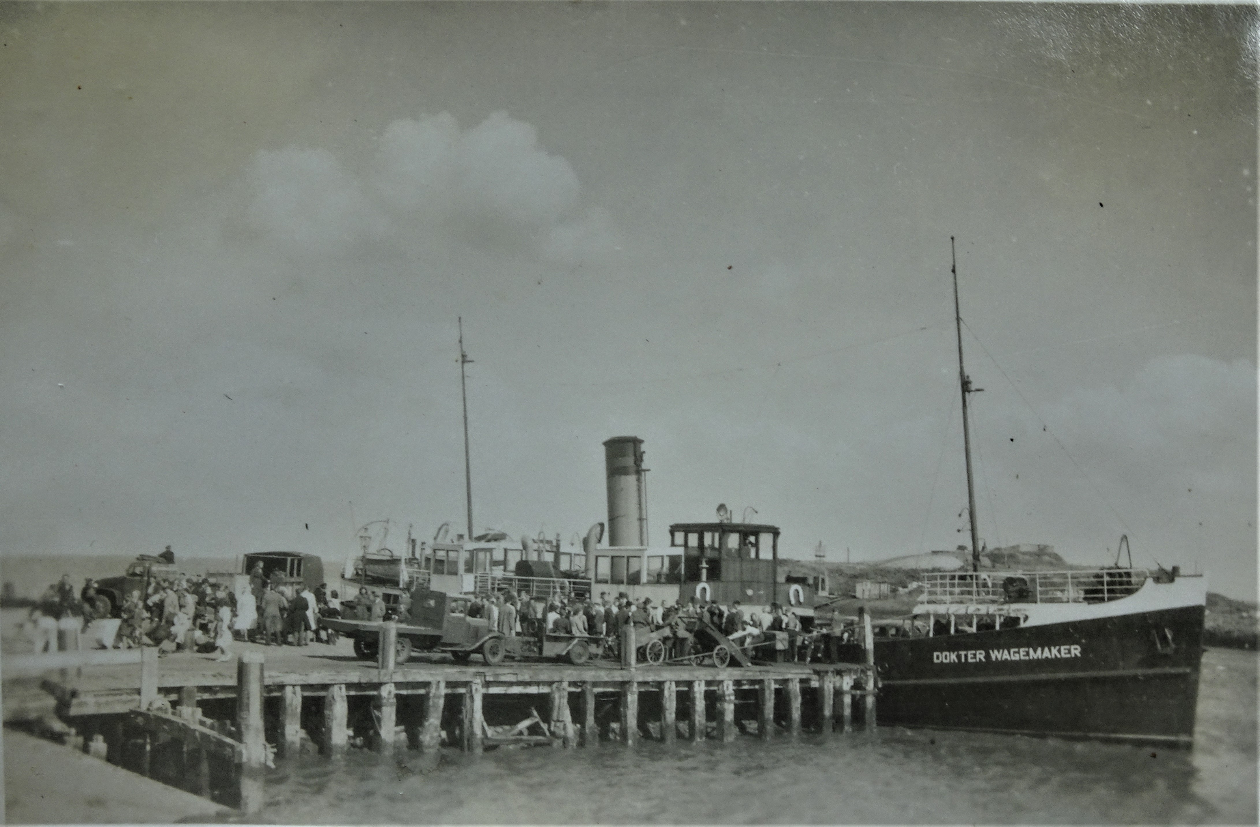 TESO-veerboot 's.s. Dokter Wagemaker' (1939) aan de steiger van 't Horntje, Texel, zomer 1946.